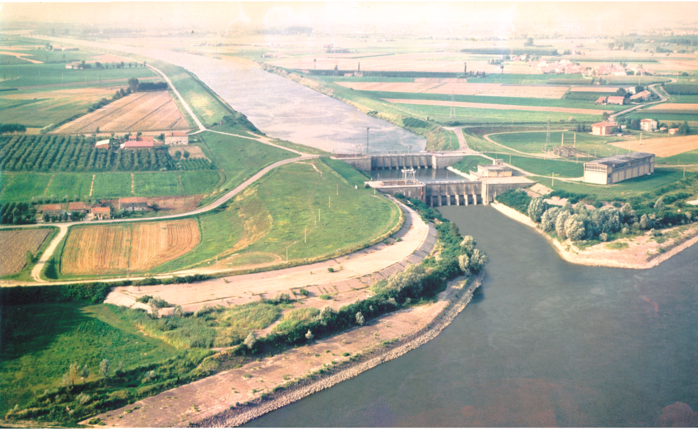 vista dall alto dell immissione del corso del Cavo Napoleonico nel fiume Po.